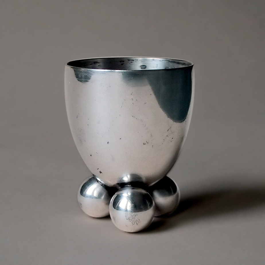 Versilberter Eierbecher aus den 1920er oder 30er Jahren. Eigene Fotografie, GNU FDL